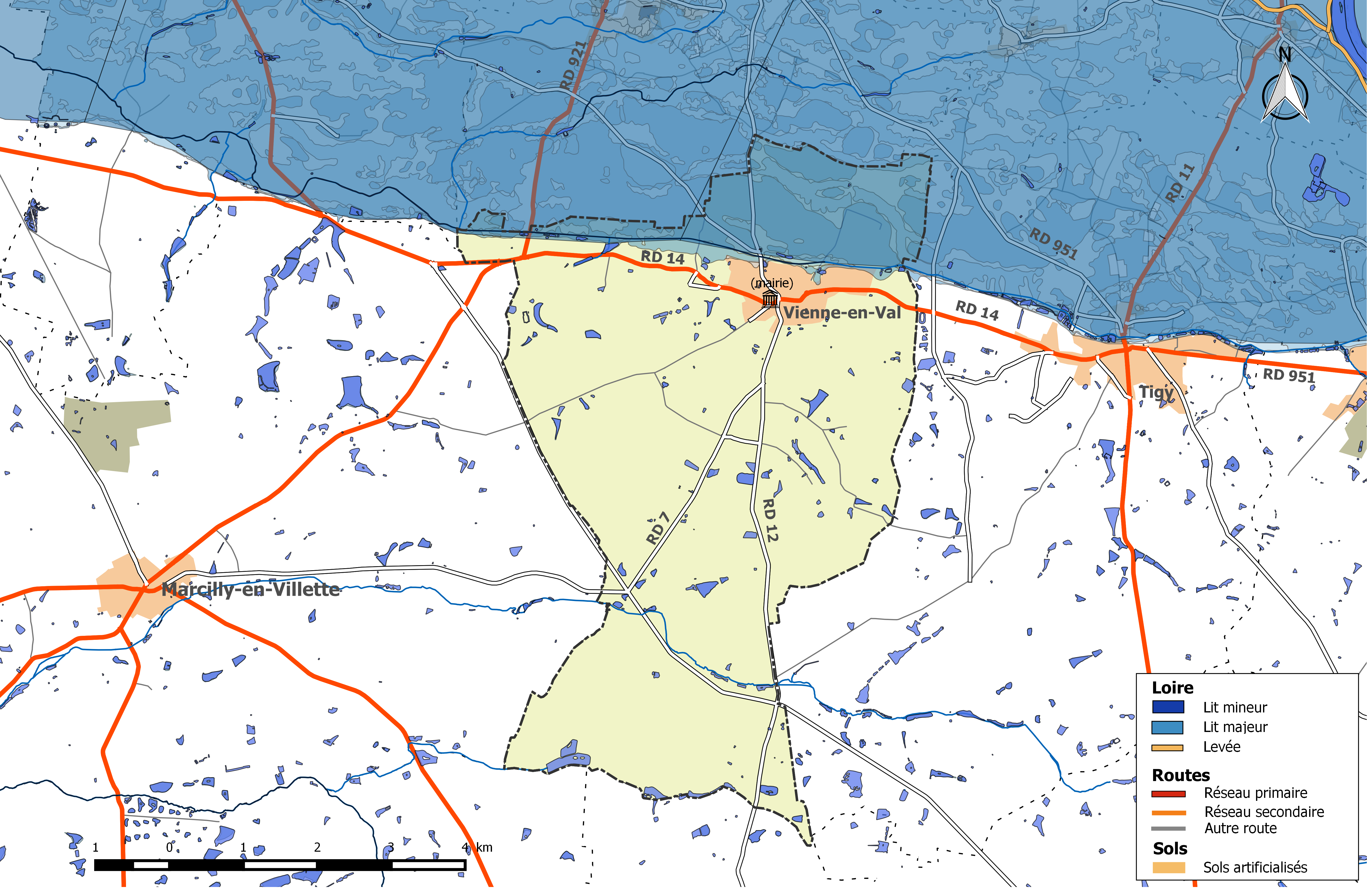 Zone inondable et réseaux hydrographique et routier de la commune de Vienne-en-Val.